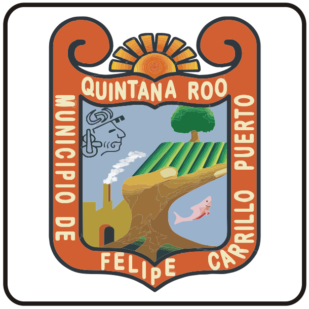 Escudo del Municipio de Felipe Carrillo Puerto